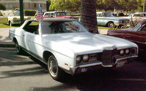 1971 Ford LTD convertible.